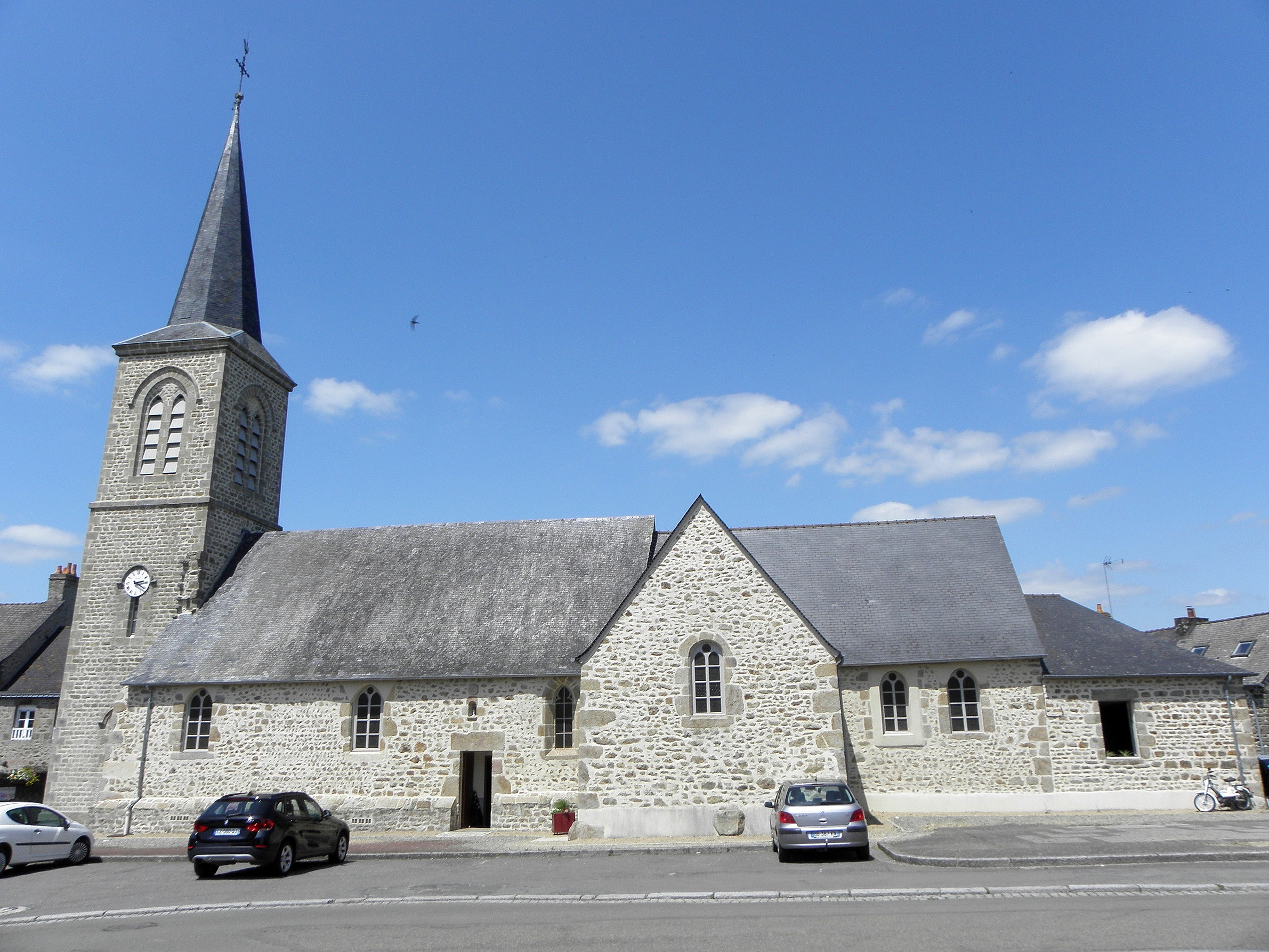 Église de Saint-Fraimbault-de-Prières (53).